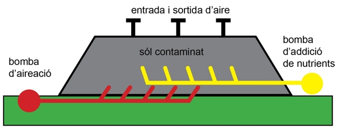 Biopiles